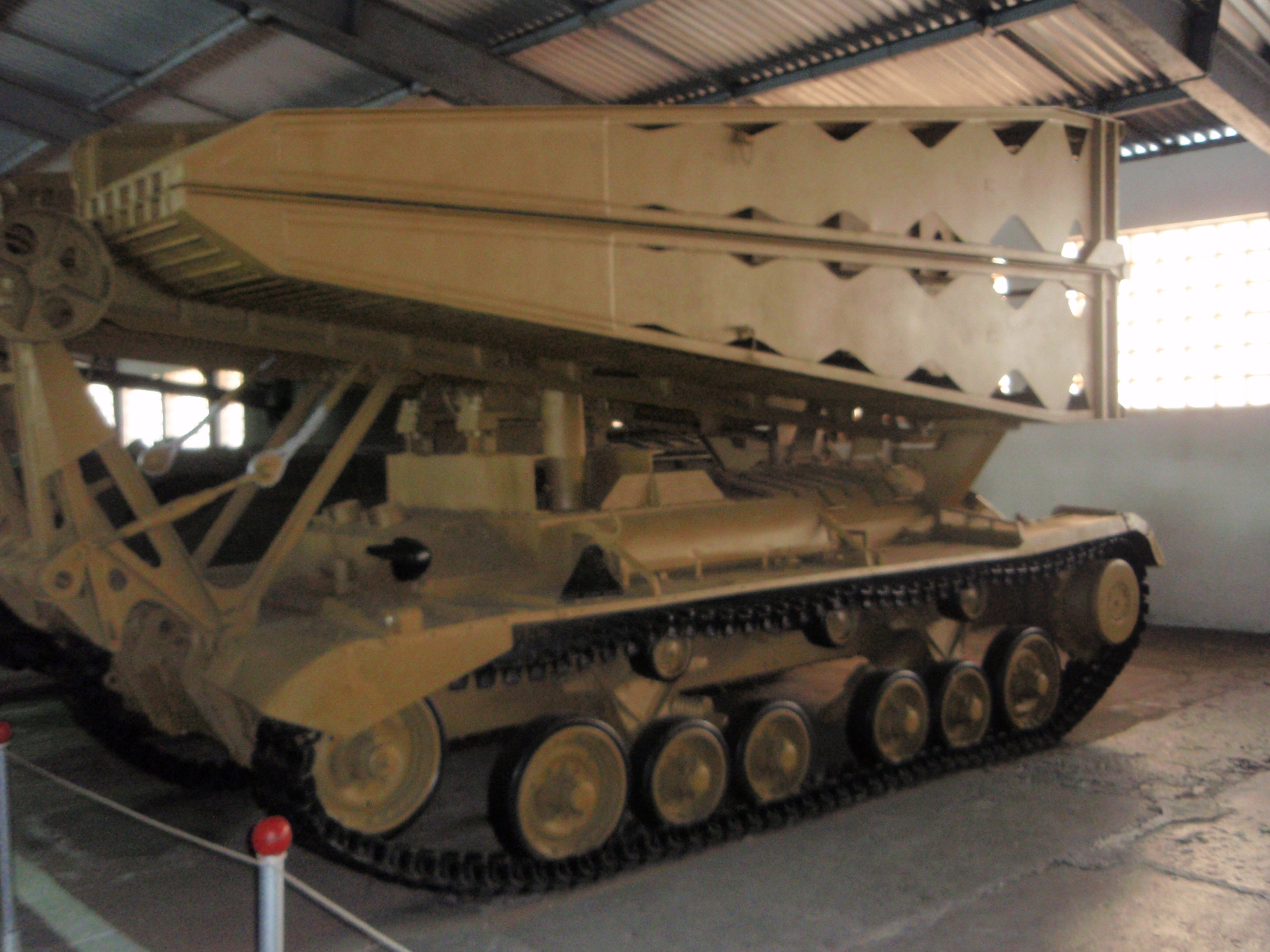 Британский мостоукладчик Mk.III (Valentain) в Кубинке